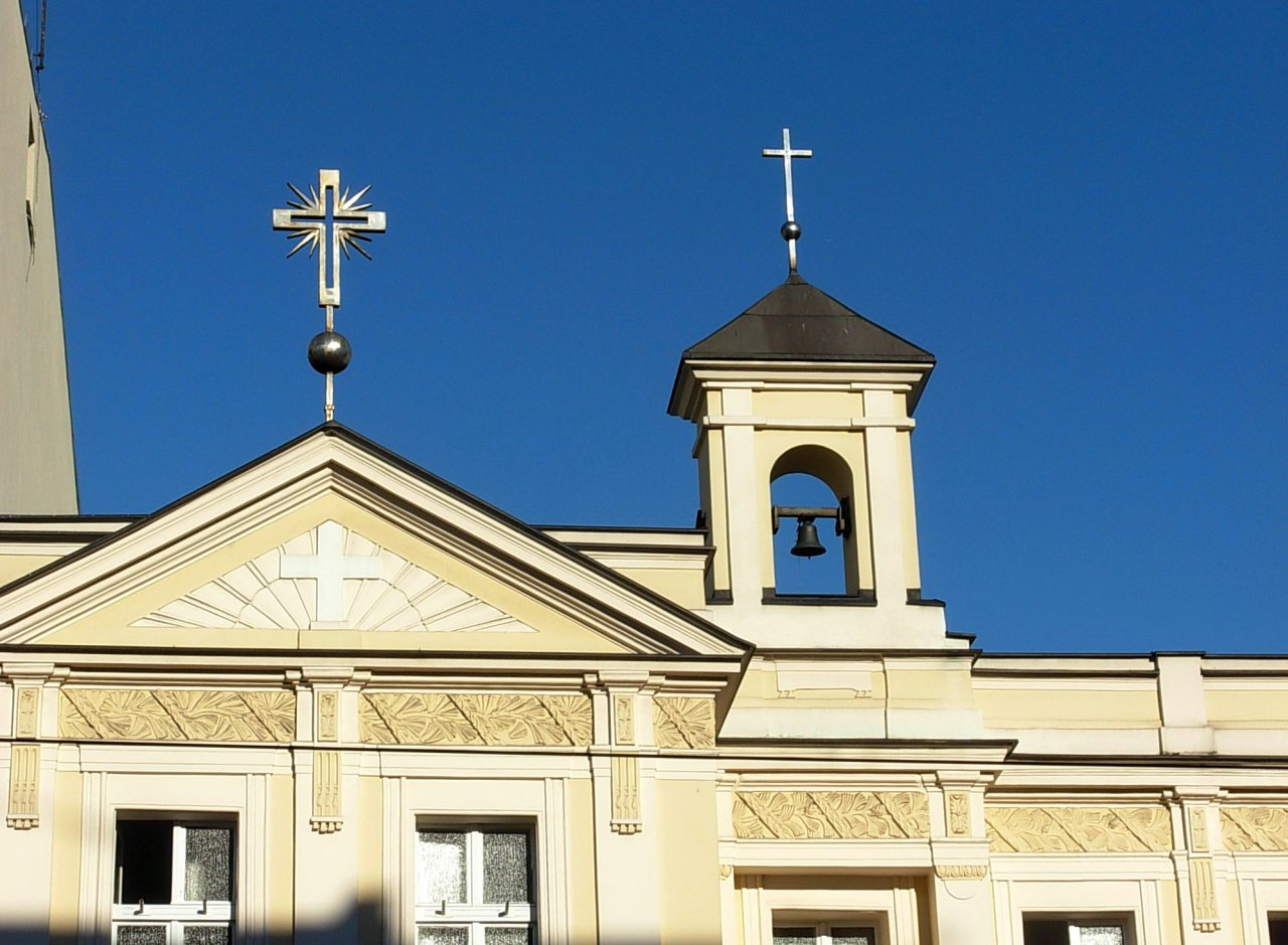 Bydgoszcz, ul. Gdańska 56 - kaplica pw. Bożego Ciała (kaplica sióstr Klarysek)